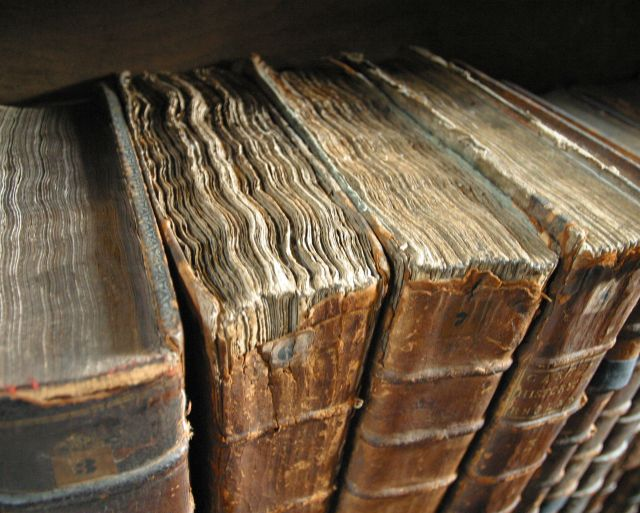 Logo per il template . Basato sull'.